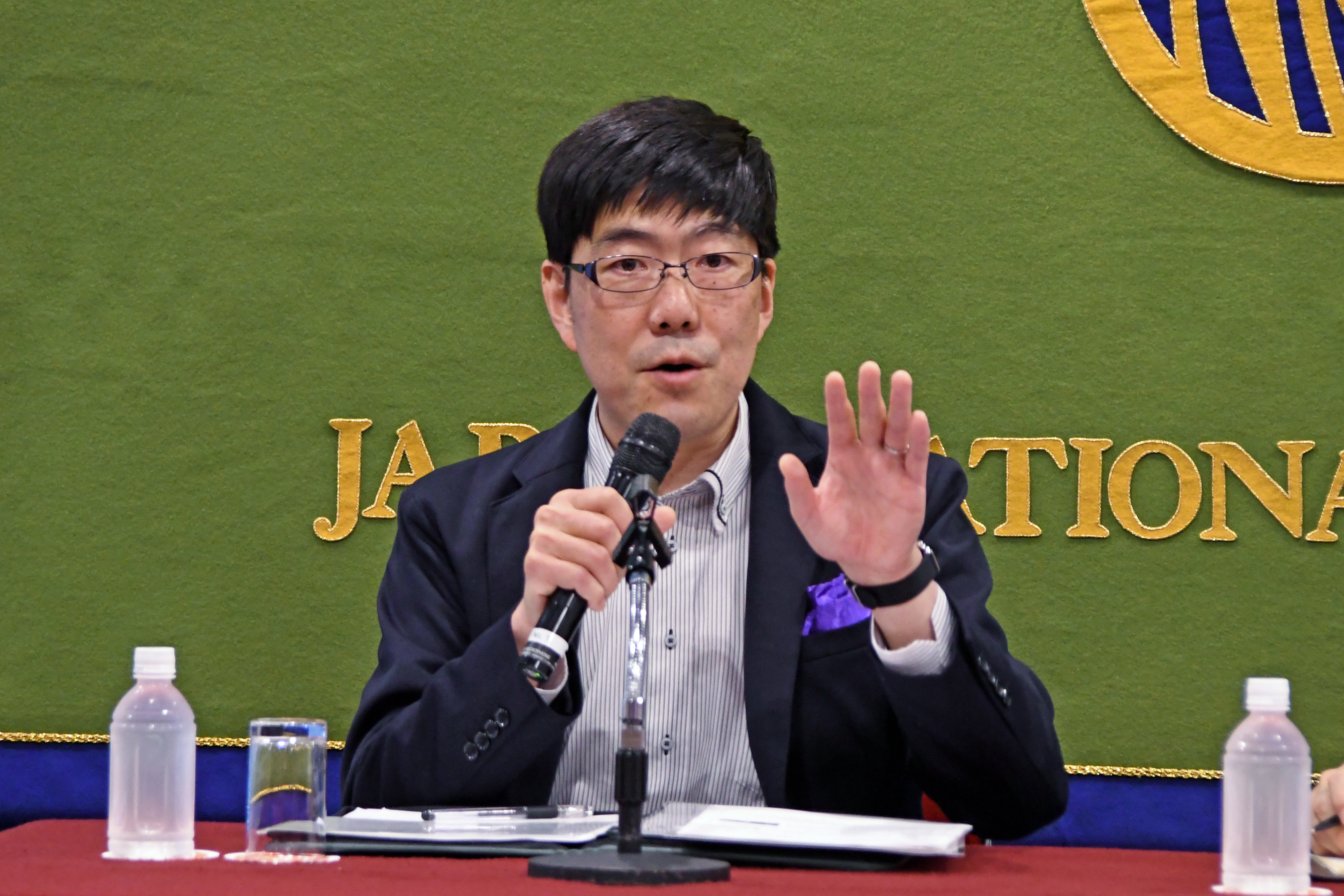 日本記者クラブでの講演（2018年5月）